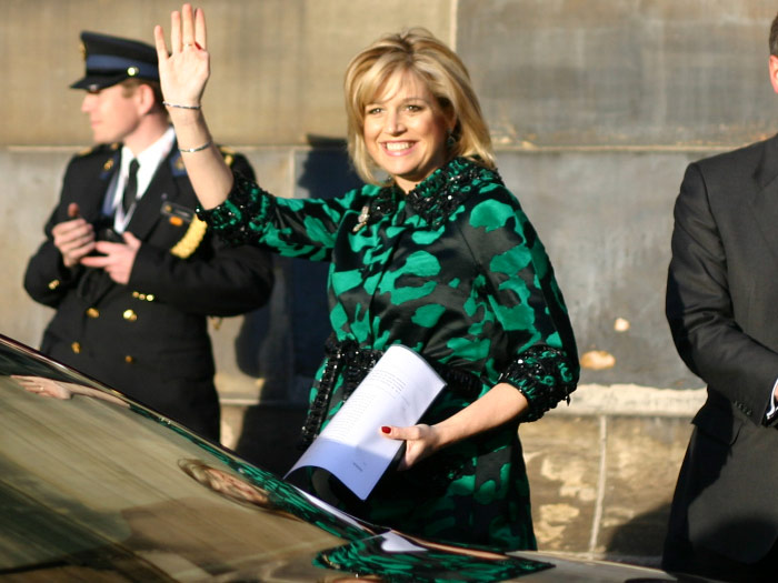 Máxima Zorreguieta pregnant.jpg